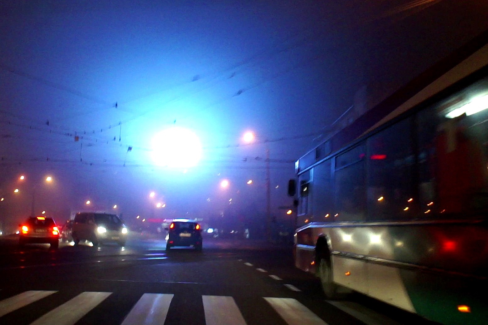 Emisja zbyt intensywnego światła przez telebim w centrum Gorzowa Wlkp.